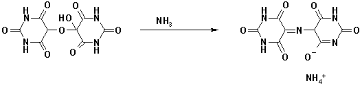 Murexide dye